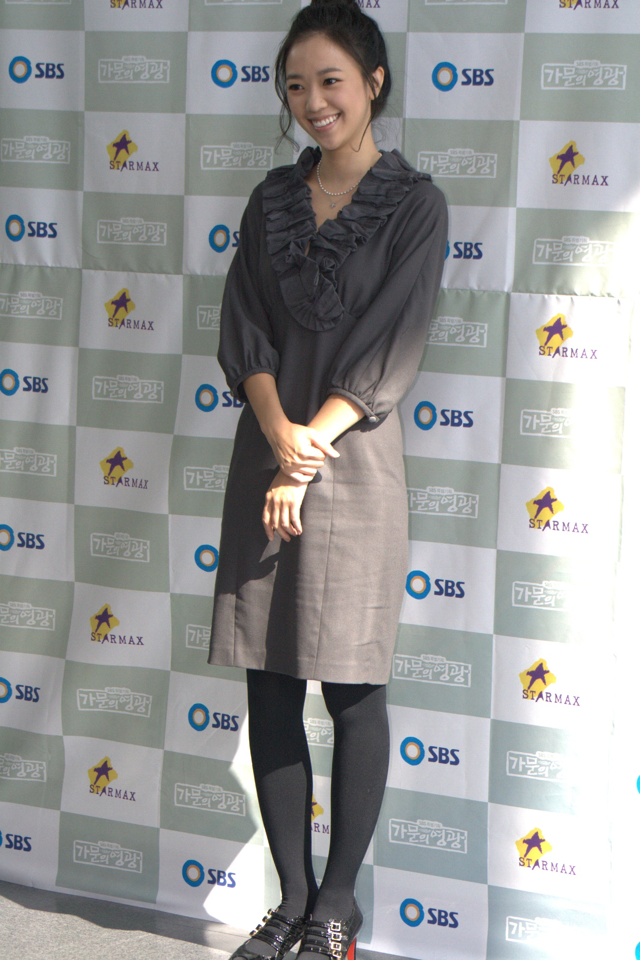 가문의 영광 제작발표회